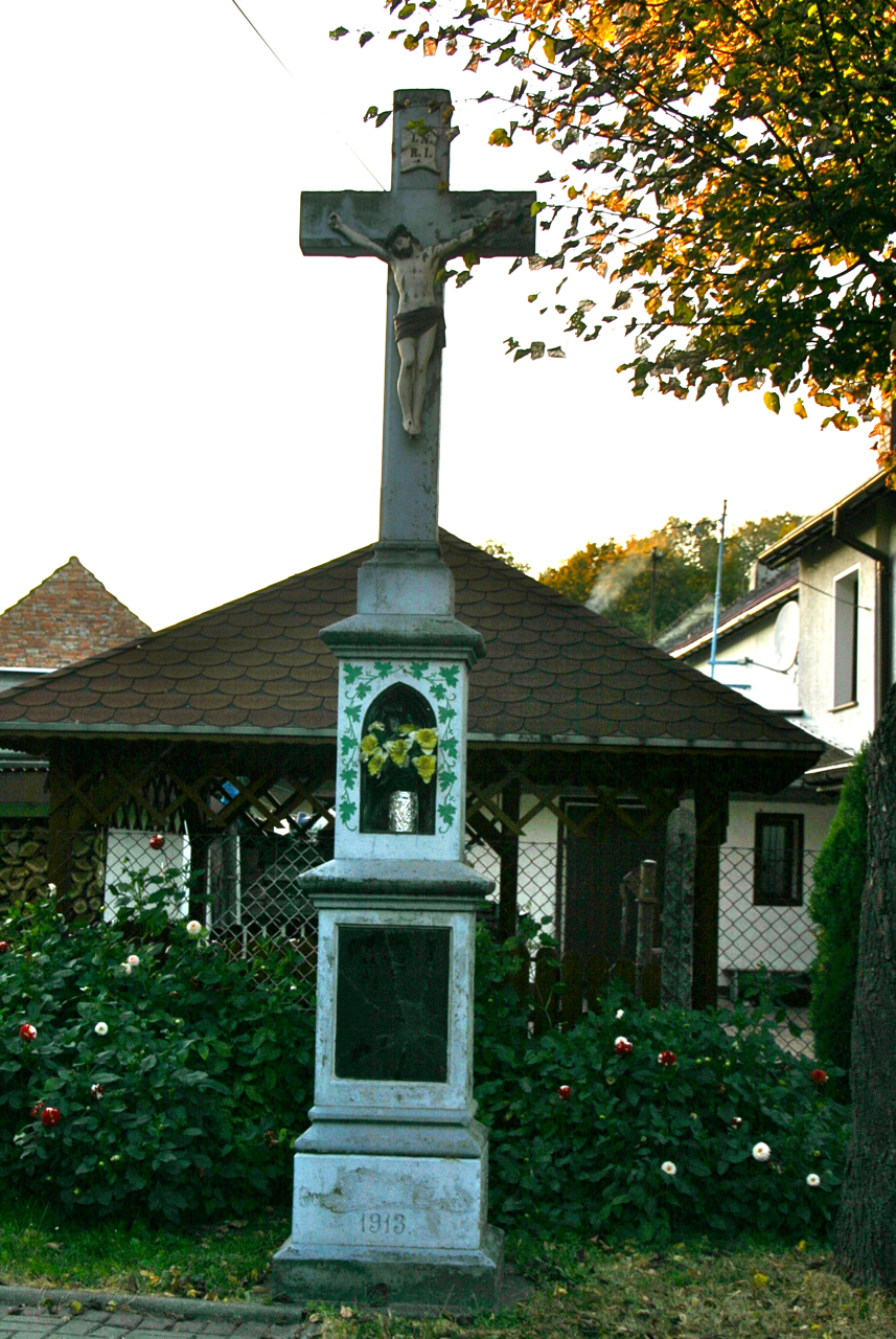 Borzysławice – wieś w Polsce położona w województwie opolskim, w powiecie kędzierzyńsko-kozielskim, w gminie Pawłowiczki.